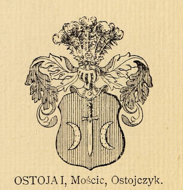 Herb ostoja według J.K. Ostrowskiego